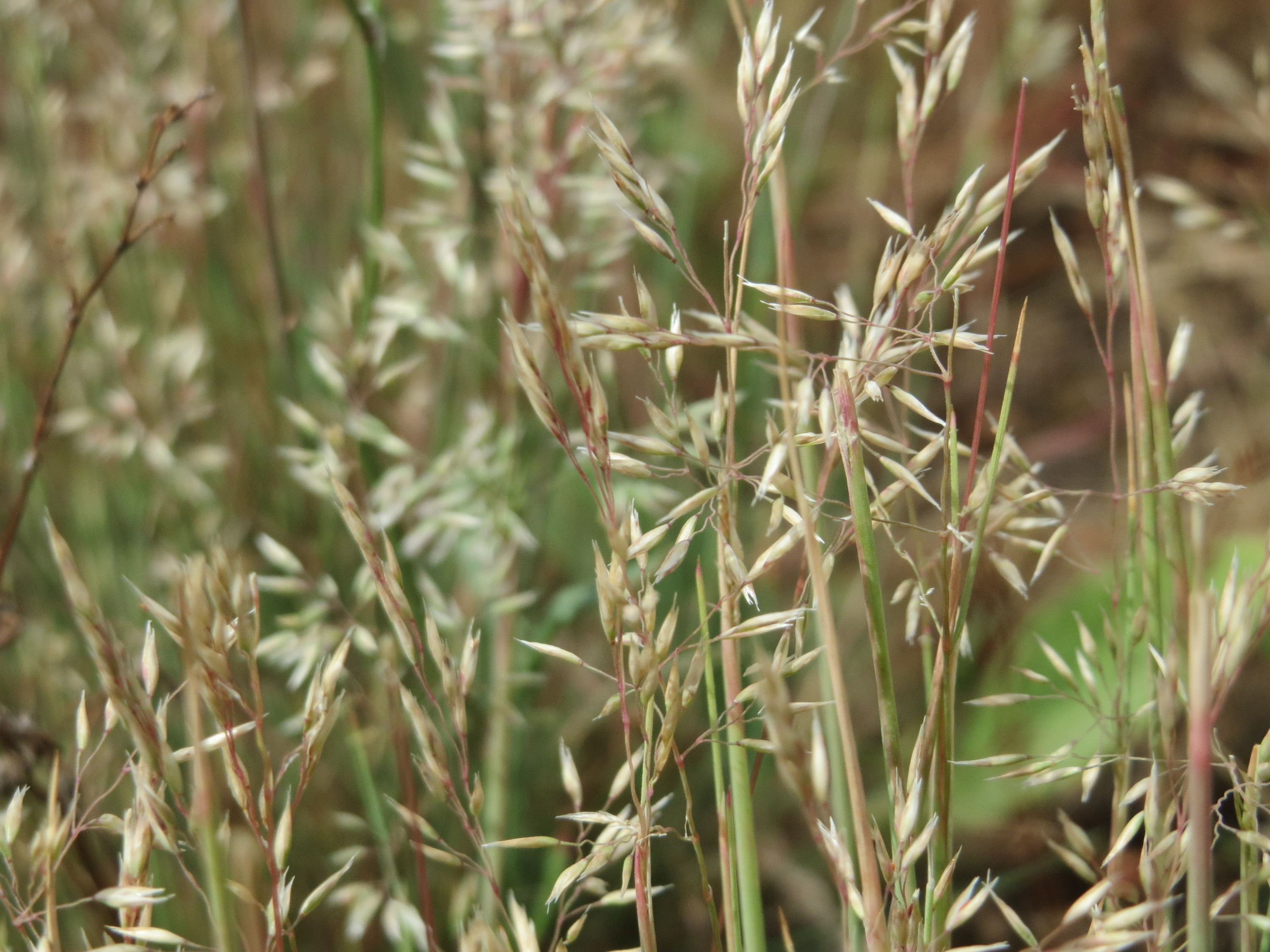 Silbergras (Corynephorus canescens) im Naturschutzgebiet Gewann Frankreich-Wiesental